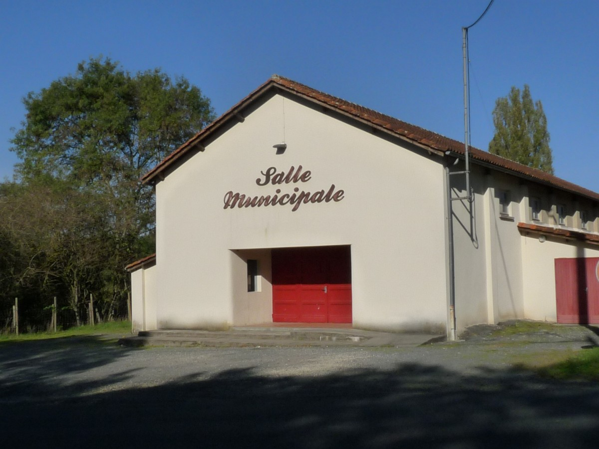 Salle municipale de Chatenet, Charente-Maritime, France